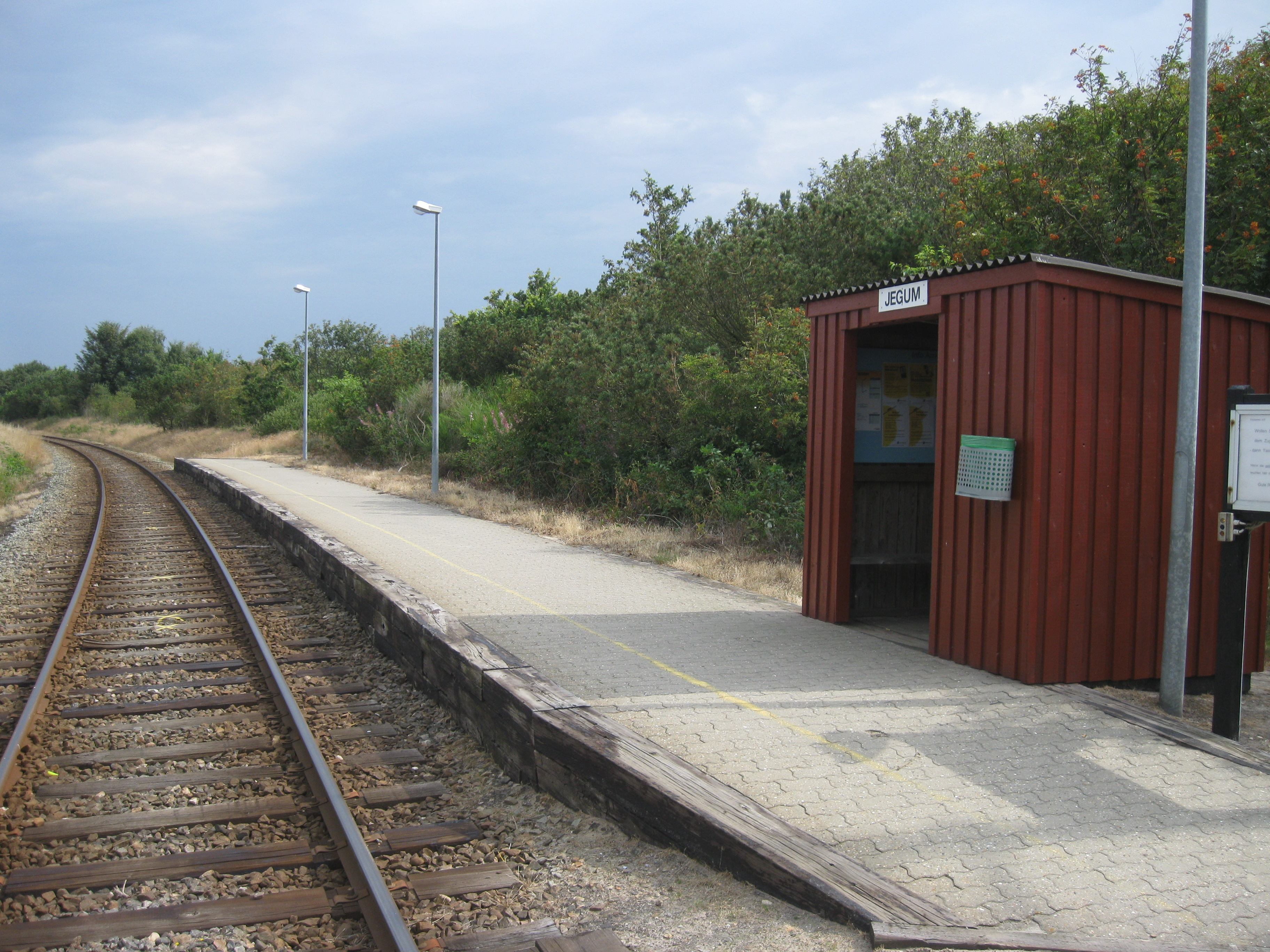 Jegum Station